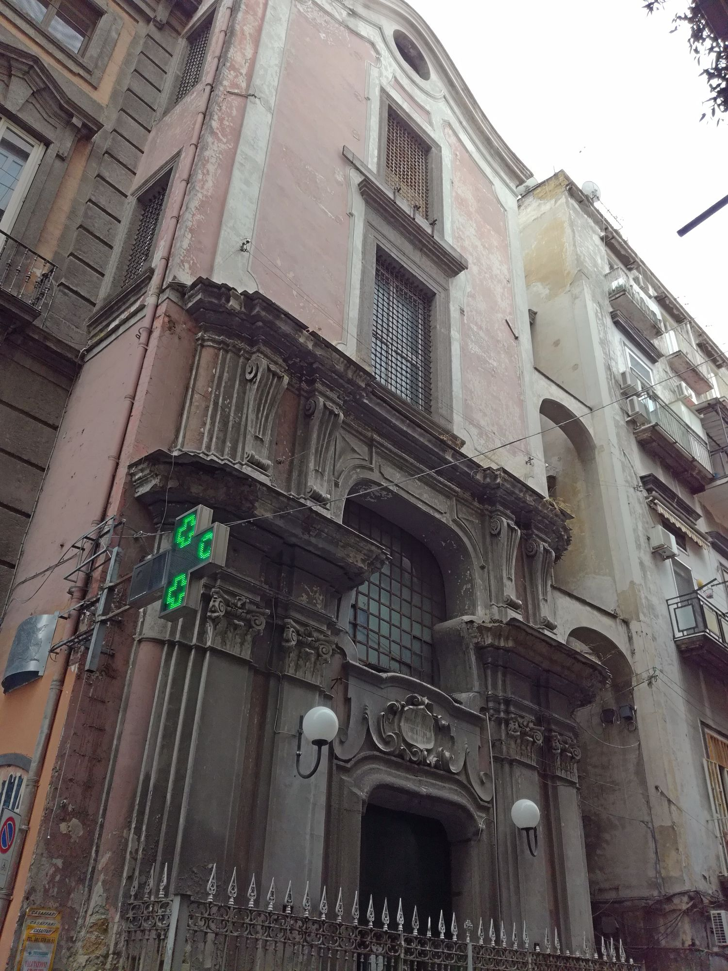 Chiesa di San Tommaso a Capuana (Napoli)